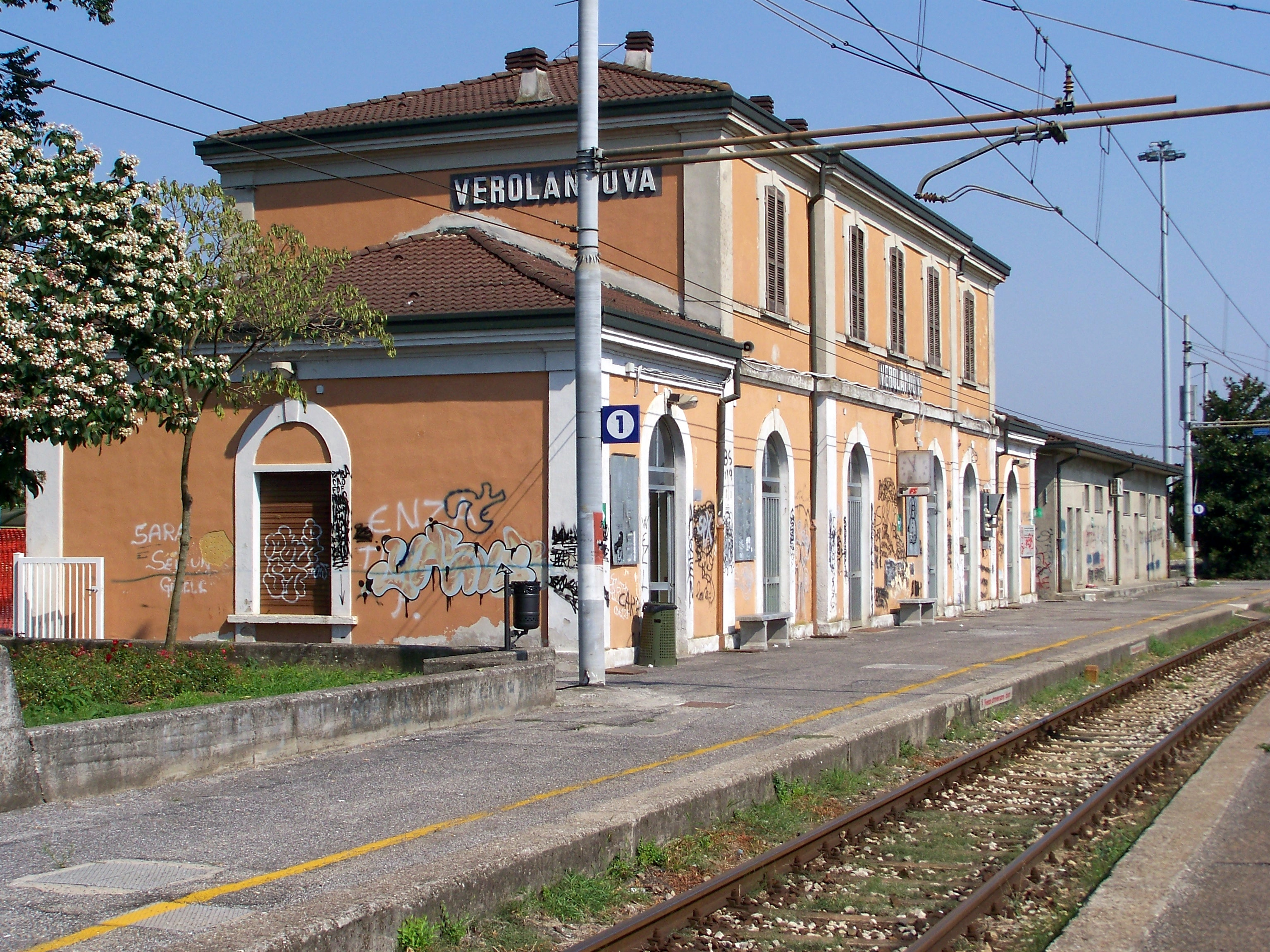 Lato ferrovia del fabbricato viaggiatori della Stazione di Verolanuova sulla Ferrovia Brescia-Cremona.